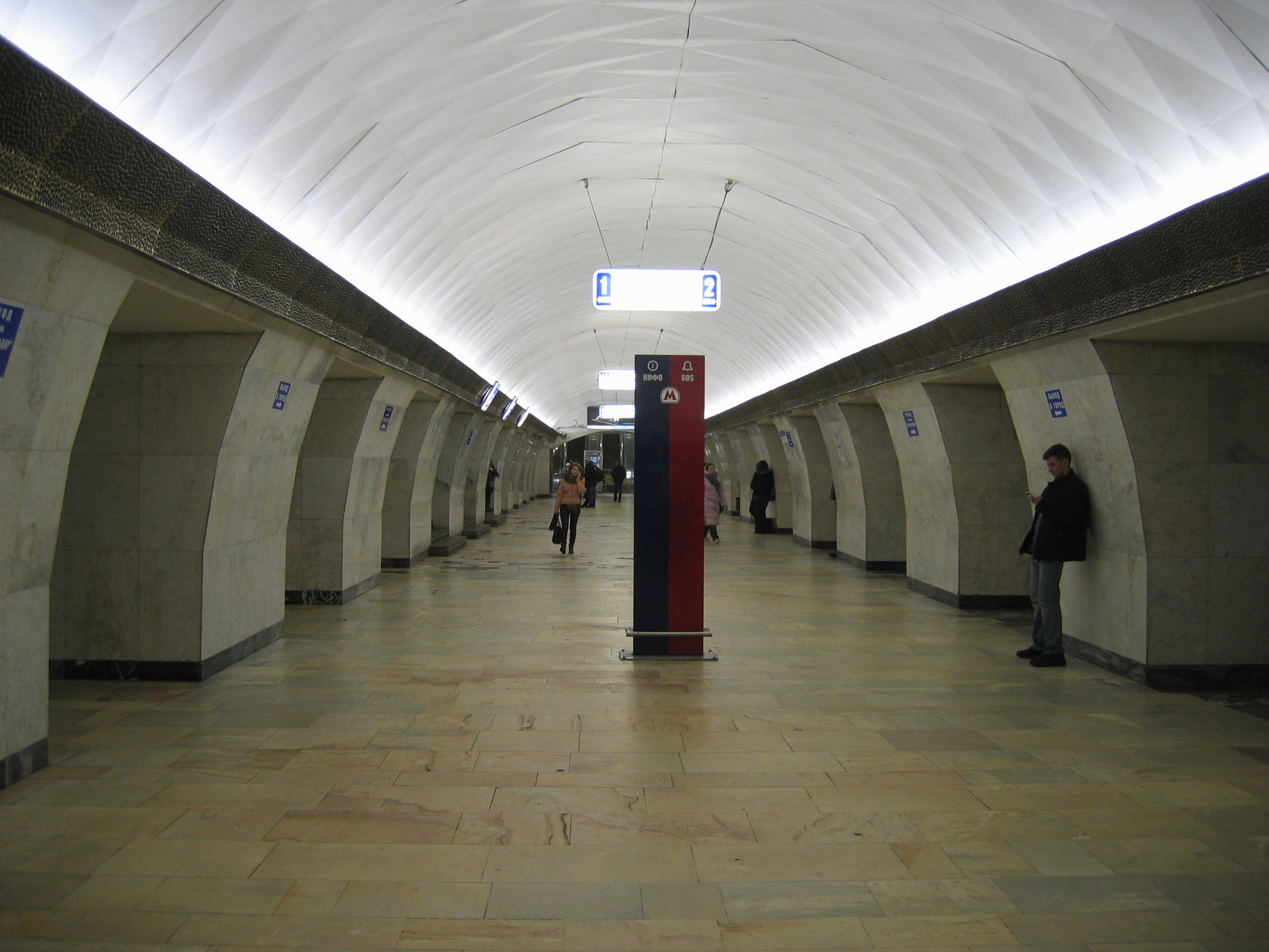 Station Turgenewskaja der Metro Moskau